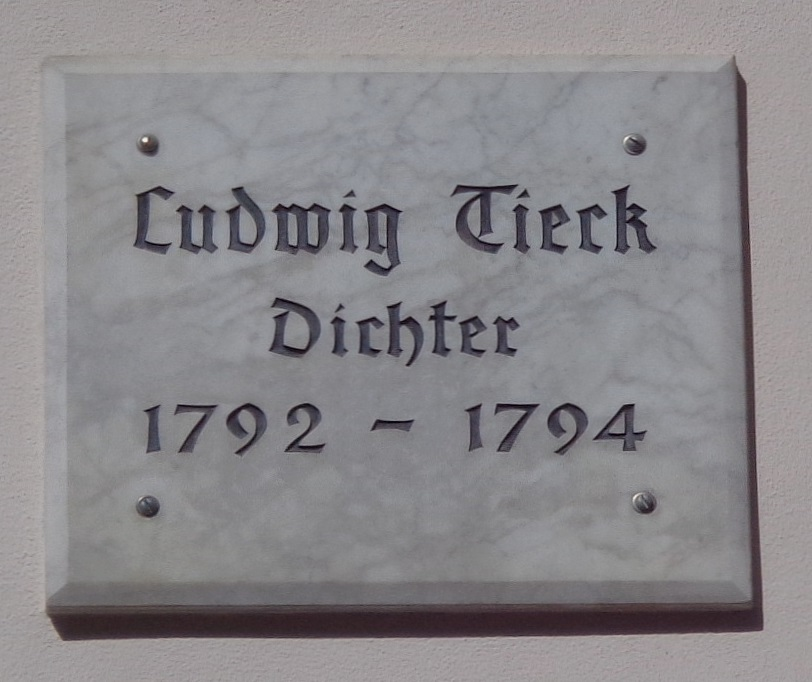 Göttinger Gedenktafel für Ludwig Tieck, Dichter (Weender Straße 23-25)